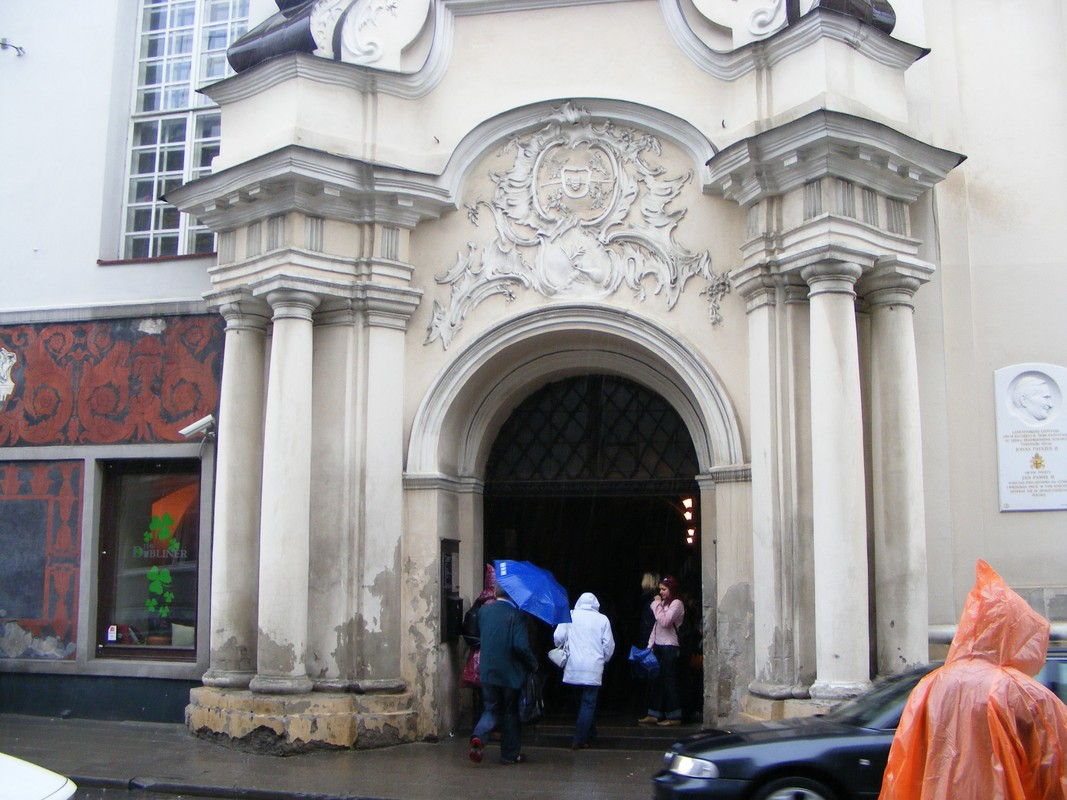 OZDOBNA BRAMA WEJŚCIOWA.